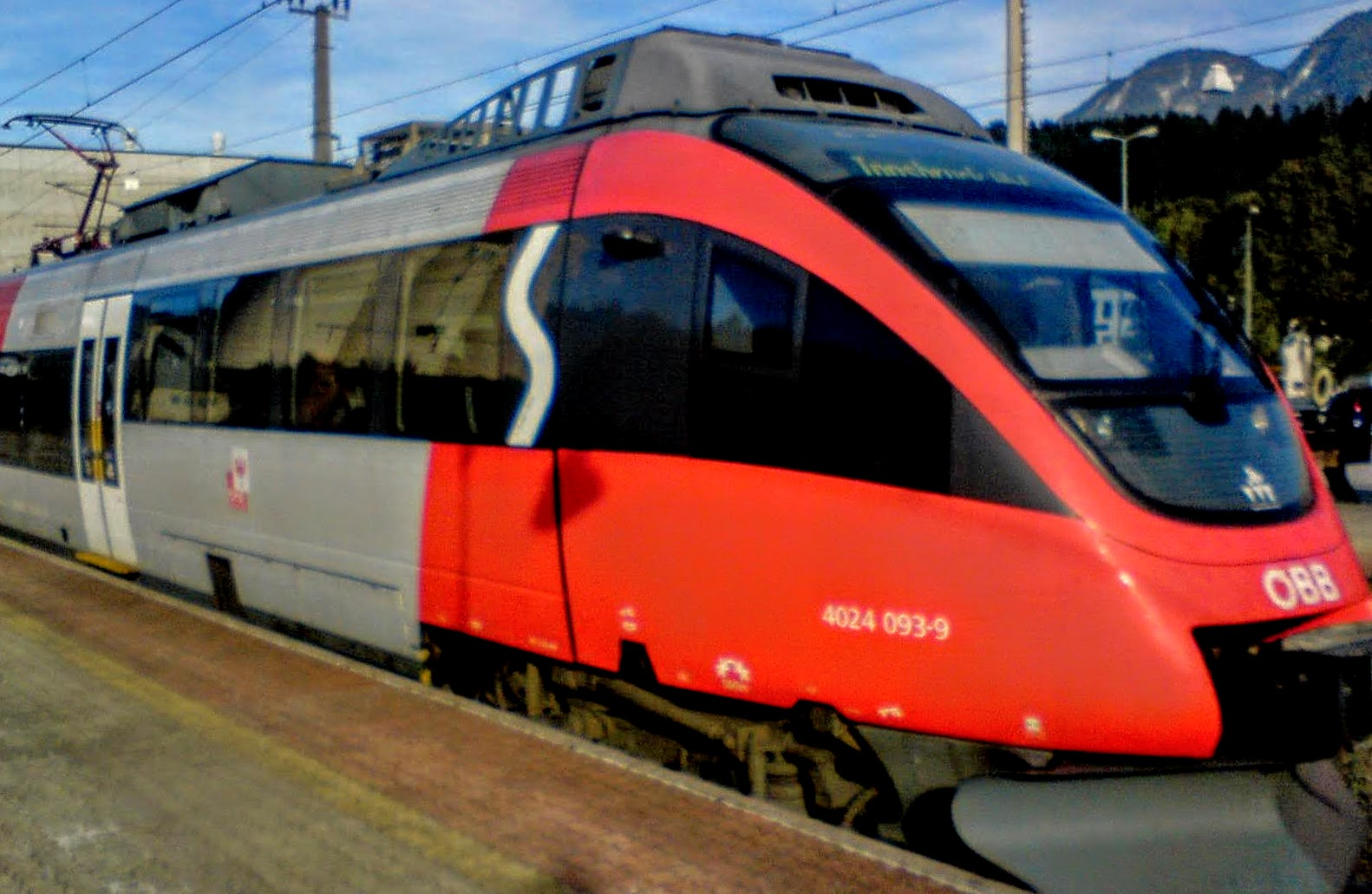 S-Bahn Tirol, neues Logo auf Triebwagengarnitur, Sommer 2010